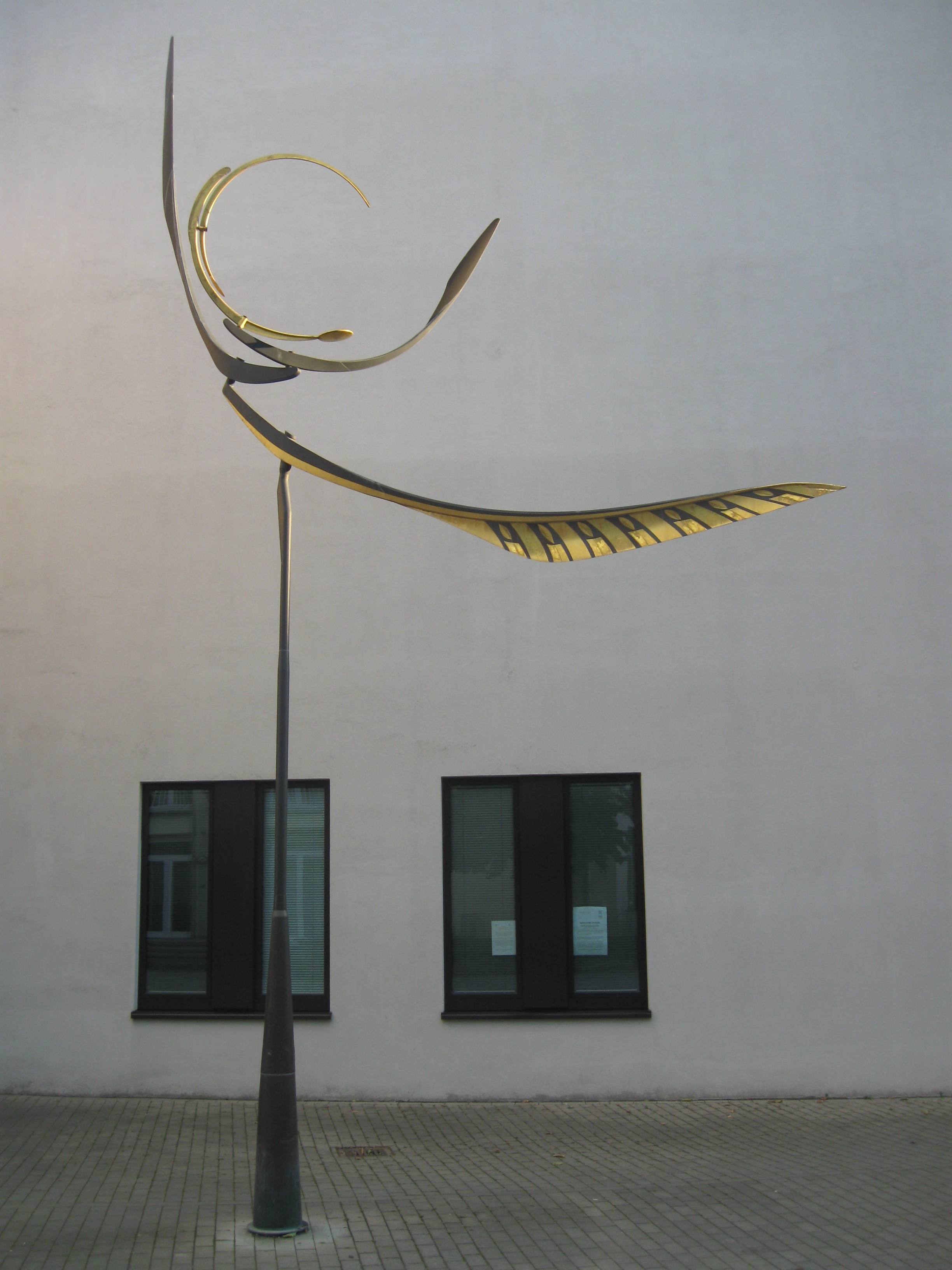 Das bewegliche Kunstwerk „Fünf-Flügler“ von Jörg Wiele vor der neuen Synagoge in Gelsenkirchen (2007).